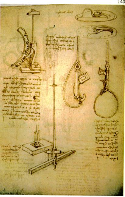 Système de décrochage automatique dessiné pat Léonard de Vinci (Codex Madrid I,f.19.v)